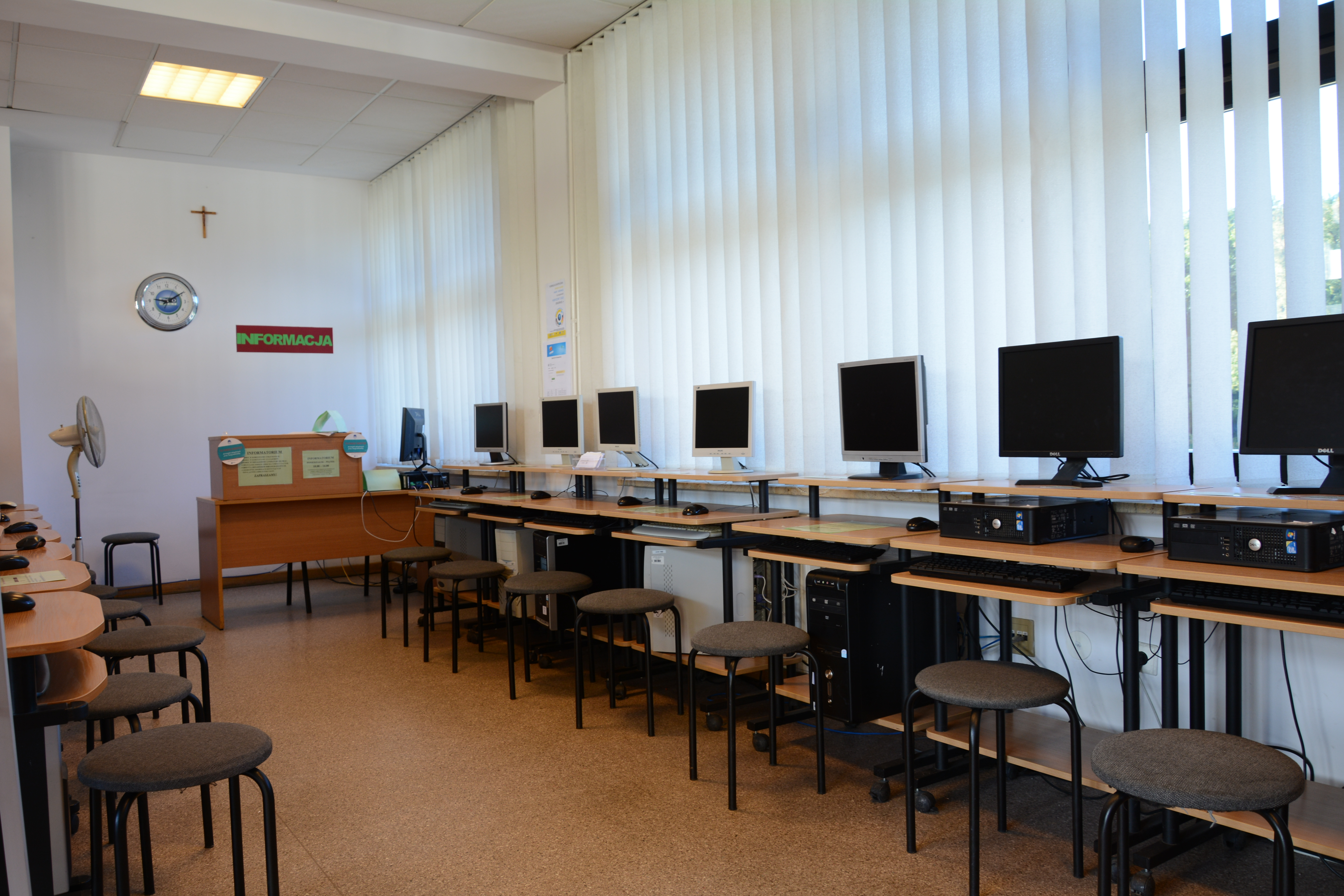 Stanowiska komputerowe i informatorium.